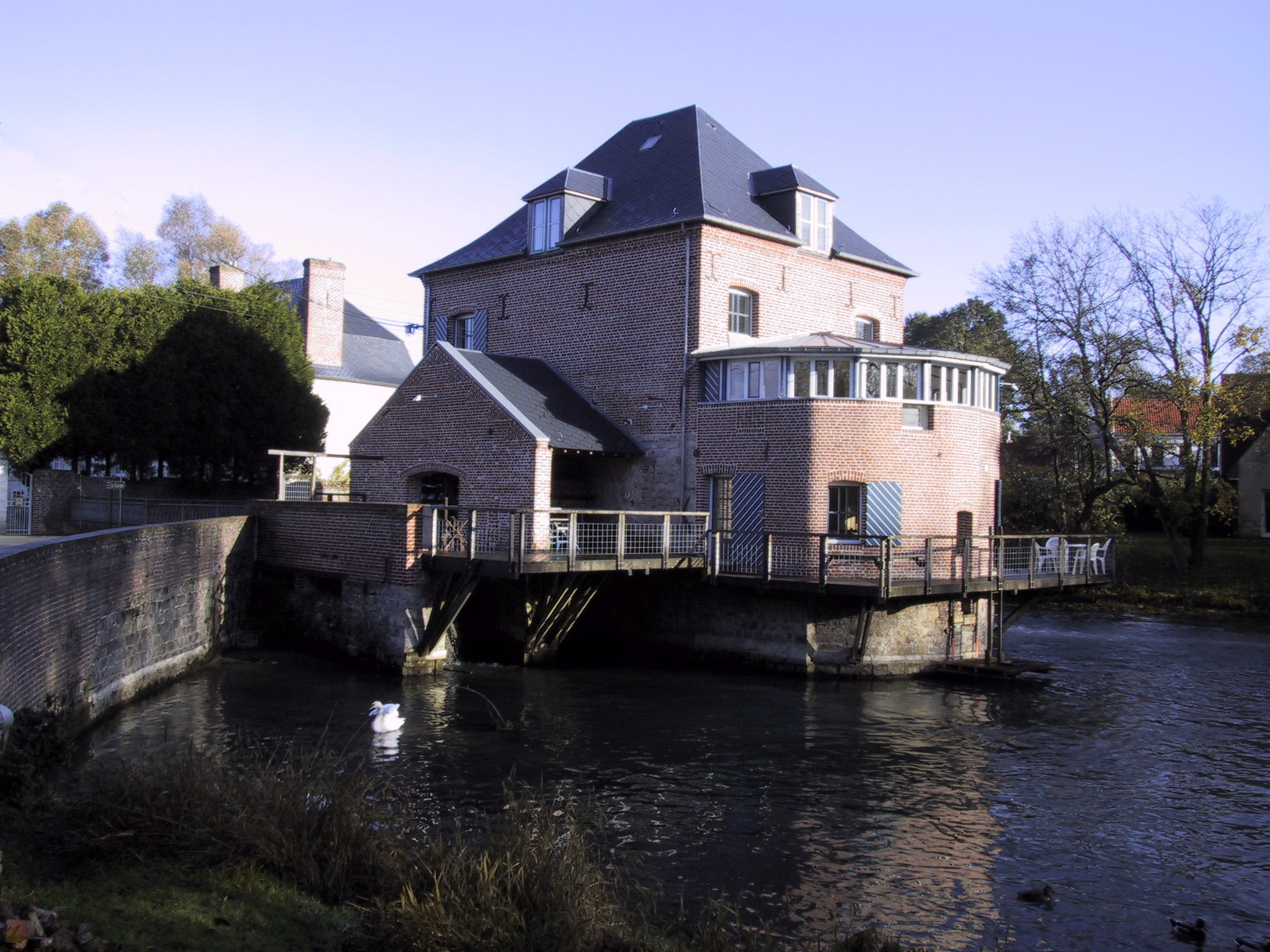 photo personnelle domaine public